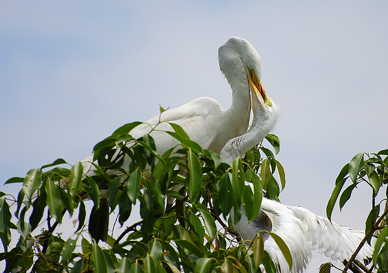 Jardim Botânico de São Paulo